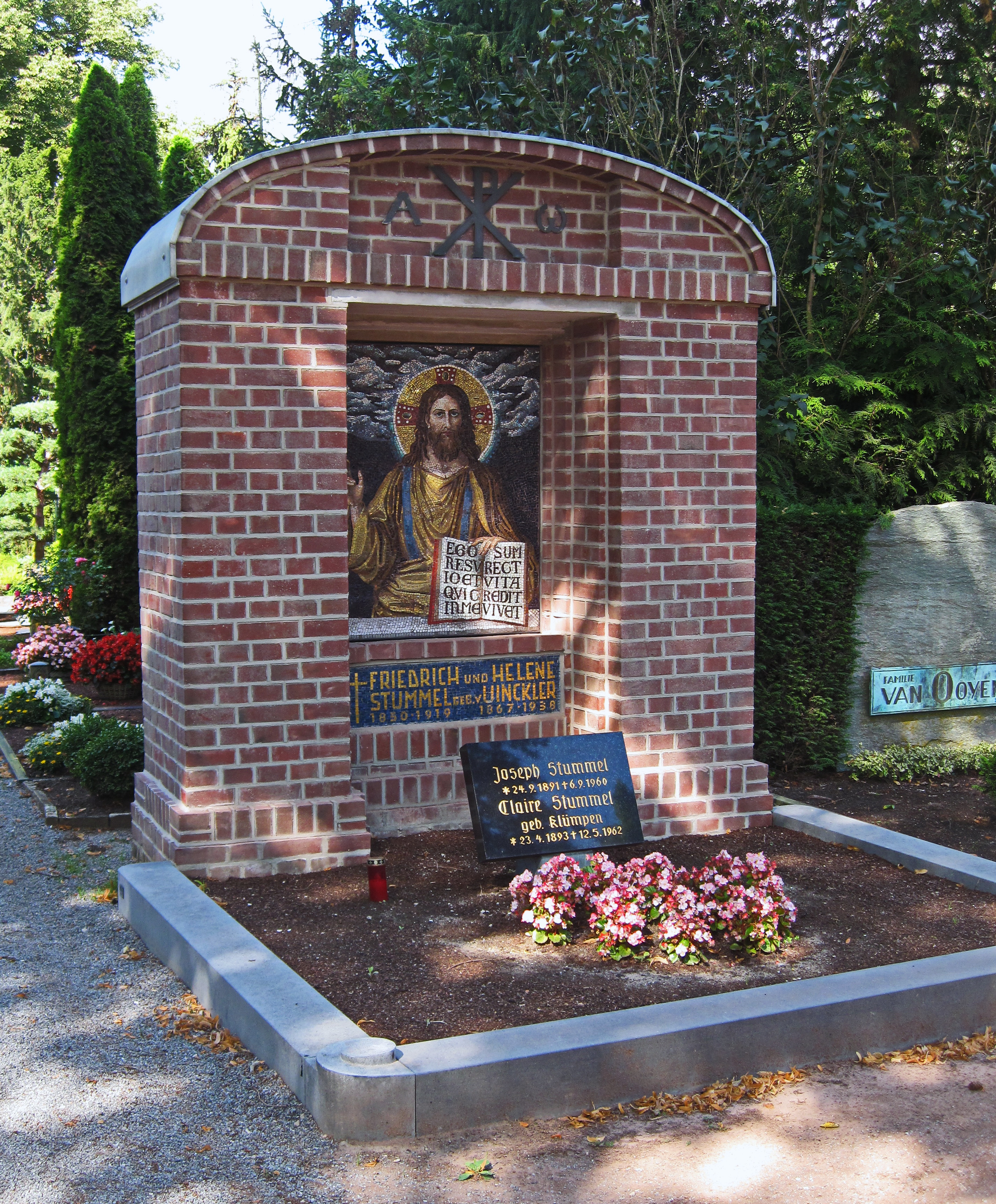 Grabstätte Stummel (Stummel-Denkmal) in Kevelaer, Friedhof.